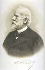 French chemist and mineralogist Charles Friedel (1832-1899)